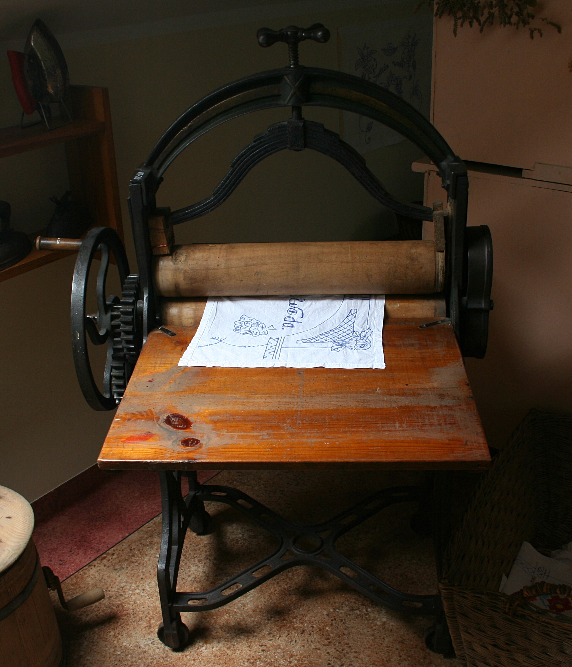 Magiel, ekspozycja muzealna w GOK w Sierakowicach, woj. pomorskie